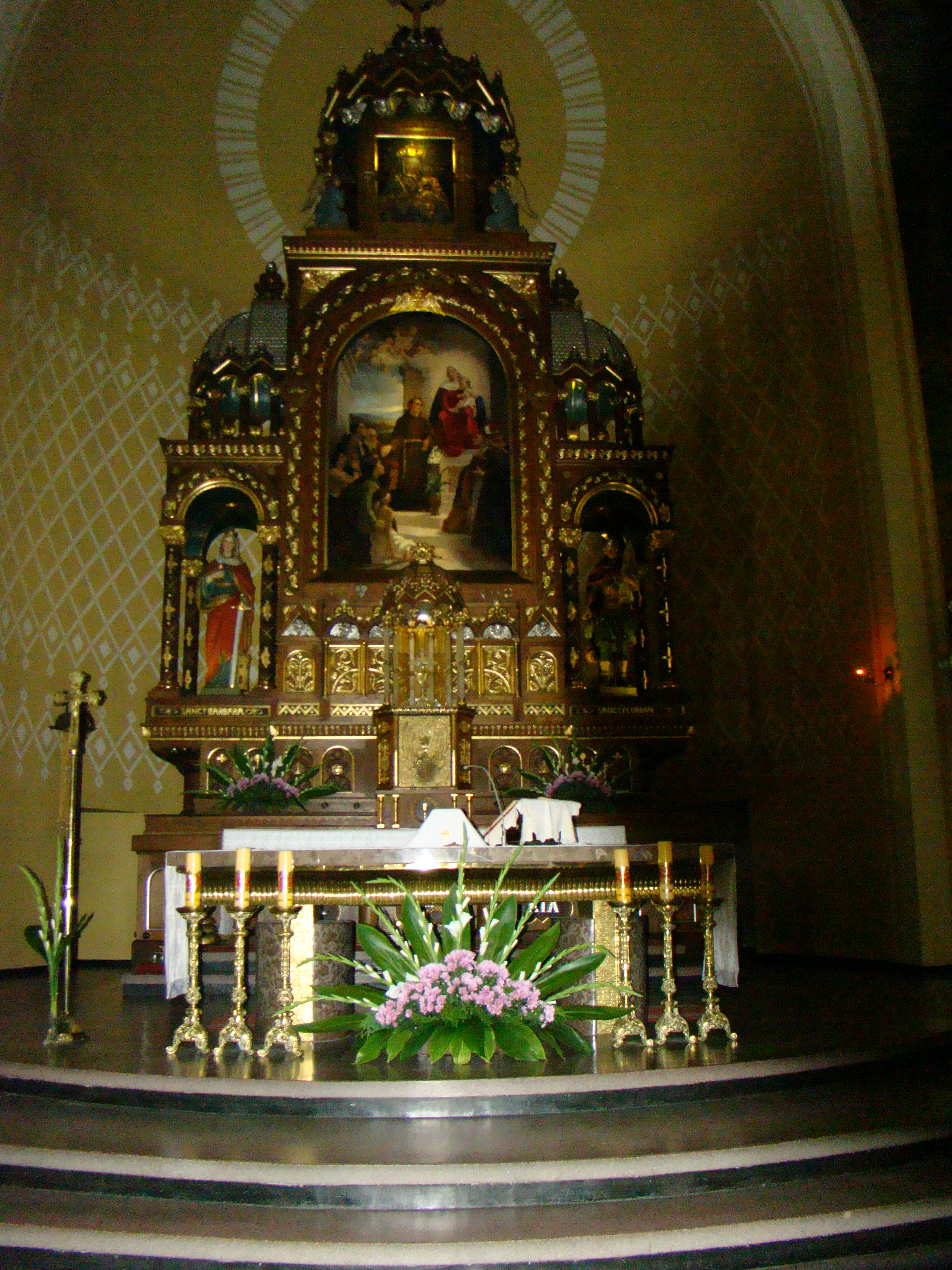 Katowice, kościół parafialny pw. św. Antoniego Padewskiego, 1907-1912